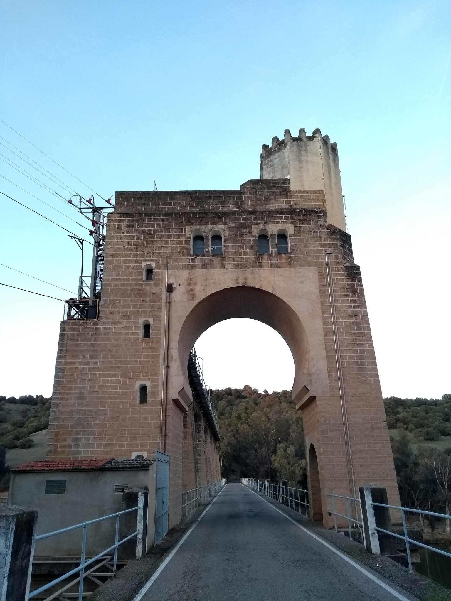 Conjunto de la Presa de El Salto